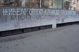 "Живело српско-албанско пријатељство" (Grafit, Pančevo, Vojvodina, Srbija)